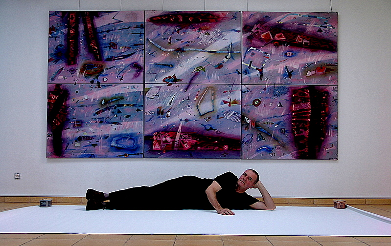 Malarz Zenon Windak